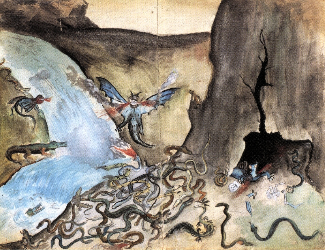 Plastische Geschichte, 1894